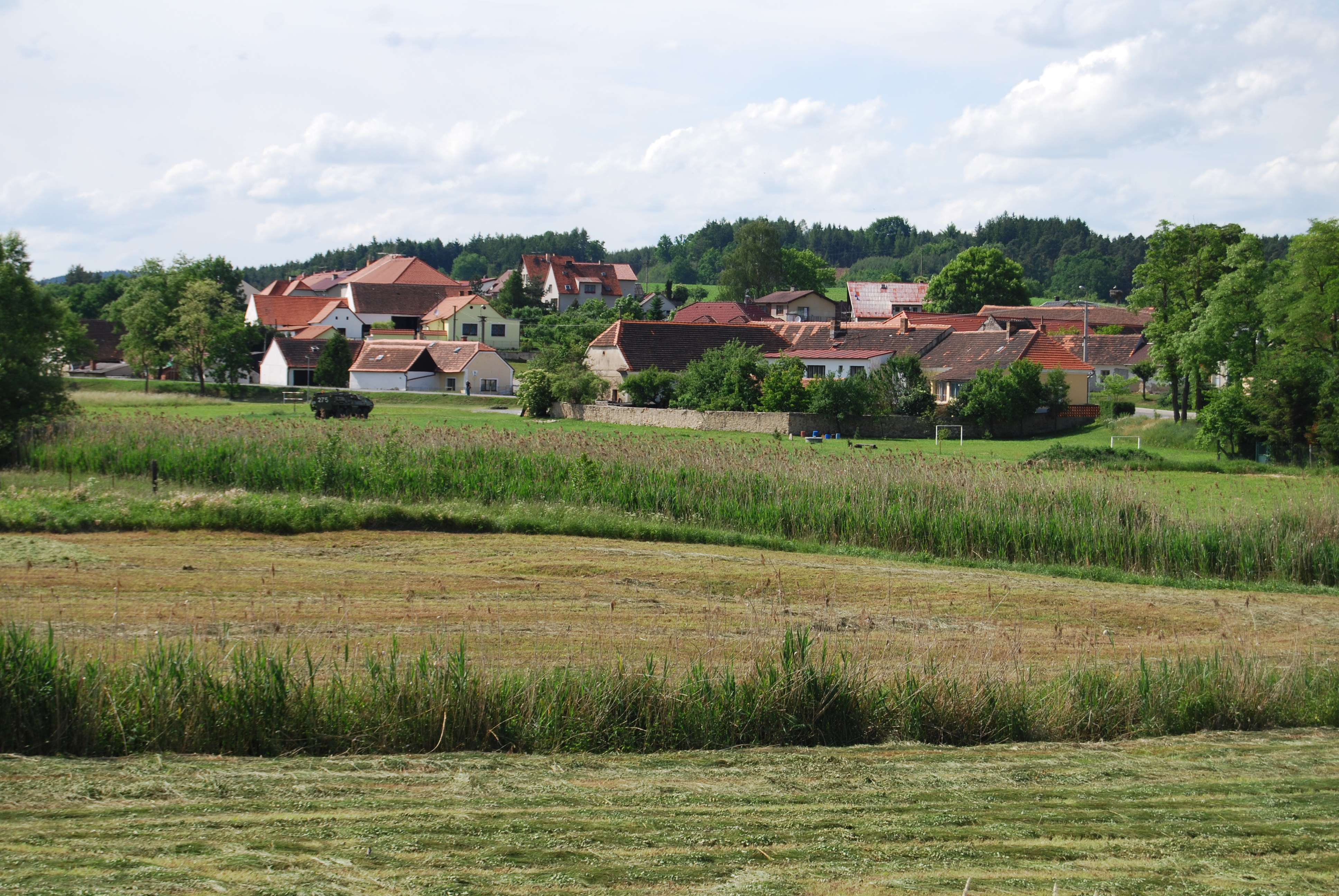 Pohled na část obce. Dobev je obec v Jihočeském kraji v okrese Písek. Česká republika.